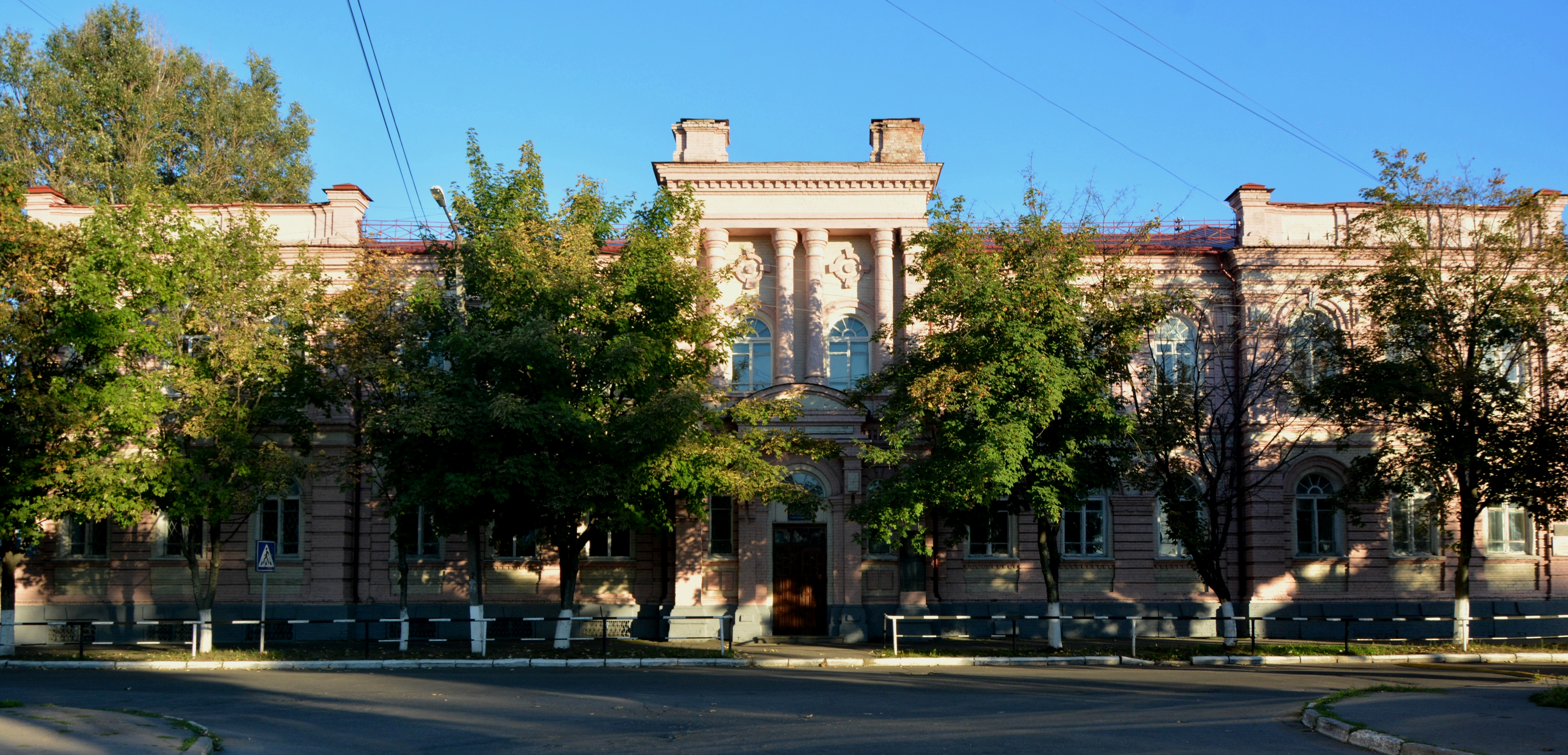 Притулок для хлопчиків купця Чуркіна (СПТУ №26), Кременчук, Вул. Чкалова, 4